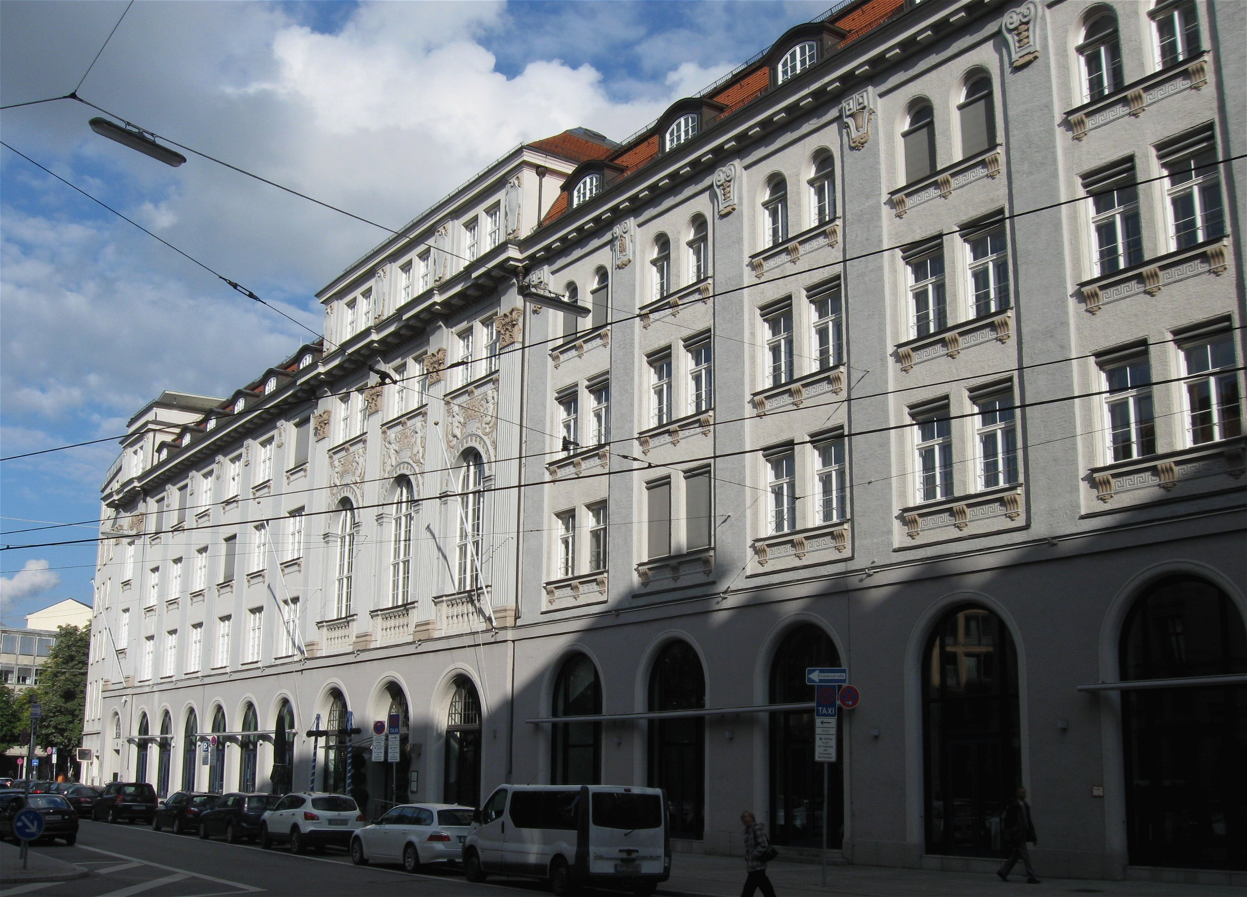 Ottostraße 4/6/8; Rückwärtiger Trakt (Erweiterungsbau, sog. Neubau) des Bernheimer-Hauses (siehe Lenbachplatz 3), stuckierte Neubarockfassade, 1909-10 von Friedrich von Thiersch; mit Innenräumen, u.a. Gobelinsaal.